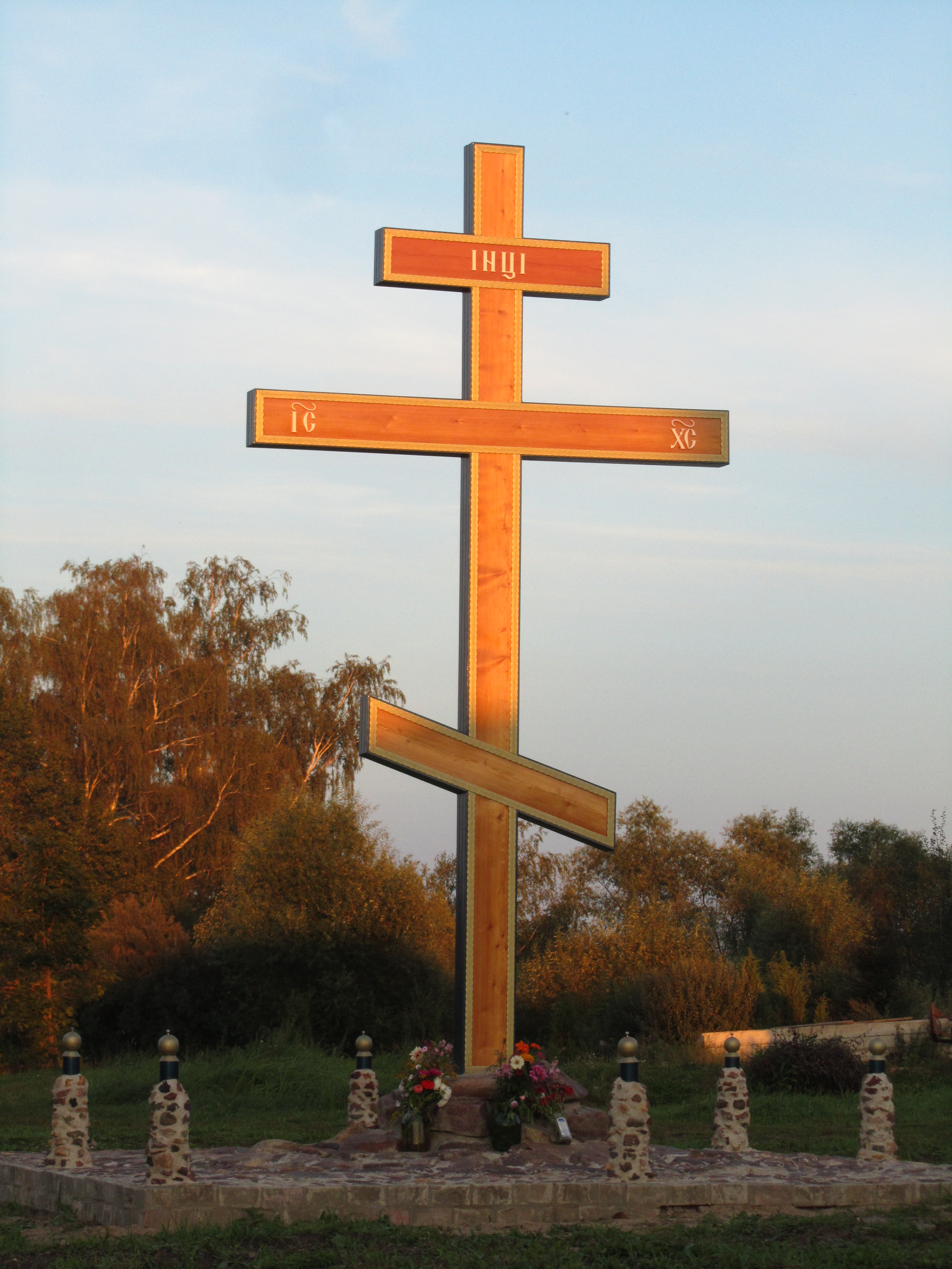 Большие горки сегодня